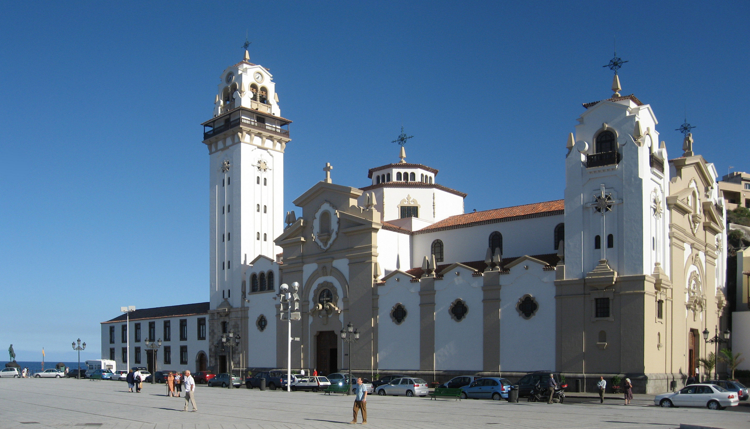 Exterior de la Basílica, Candelaria, Tenerife